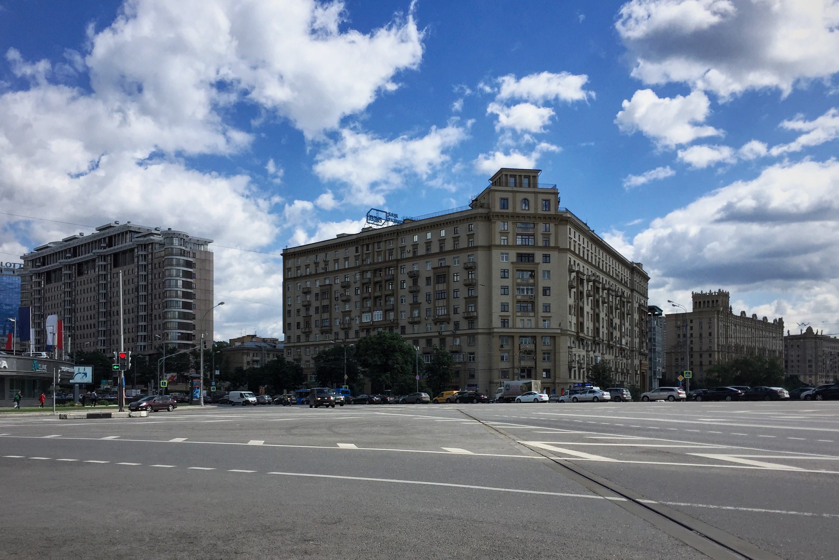 Новый Арбат, площадь Свободной России. В центре дом 1939 года (Новый Арбат, 31/12) арх. Щусева и Ростковского. Он был построен вдоль только лишь намечавшейся трассы Нового Арбата, на высоком холме; существовавший тогда Новинский переулок проходил южнее, а между ним и новым домом стояли домики. После строительства Новоарбатского моста остатки того холма можно увидеть лишь с набережной.